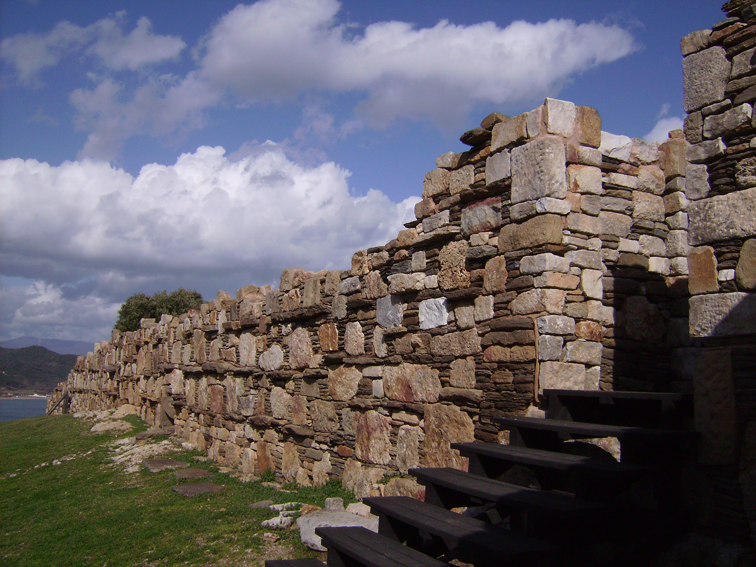 «Τορώνη»